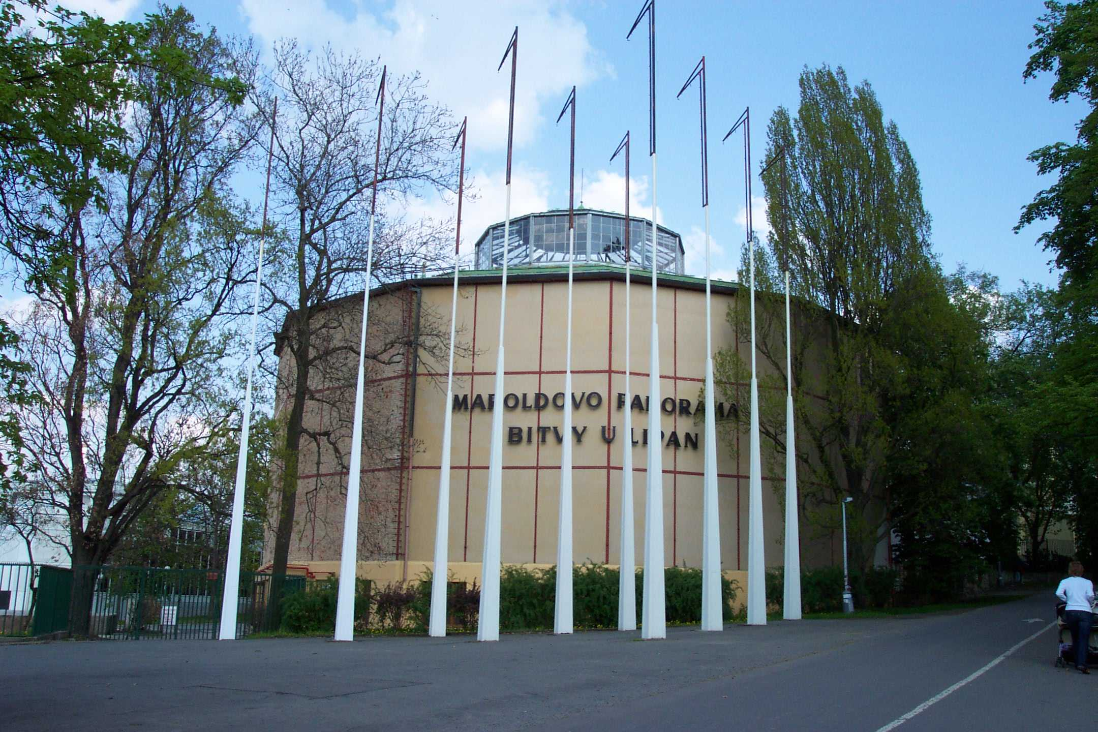 Maroldovo panorama, Praha